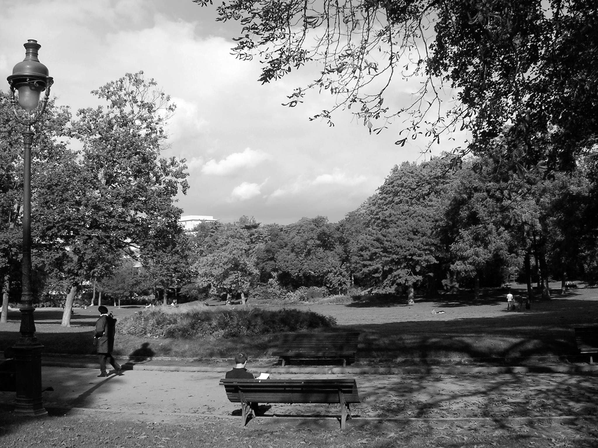 Vue du parc Montsouris, Paris, France 04-10-2006